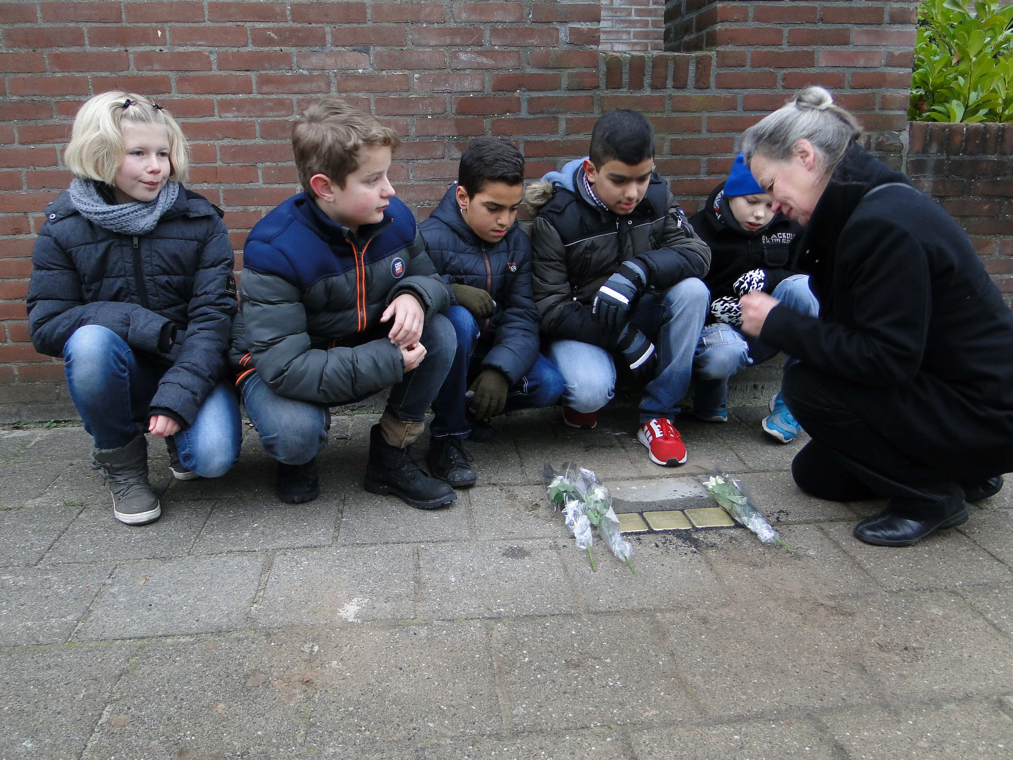 Steenwijk